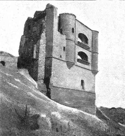 Ruinas venerandas. El castillo de la Mota.